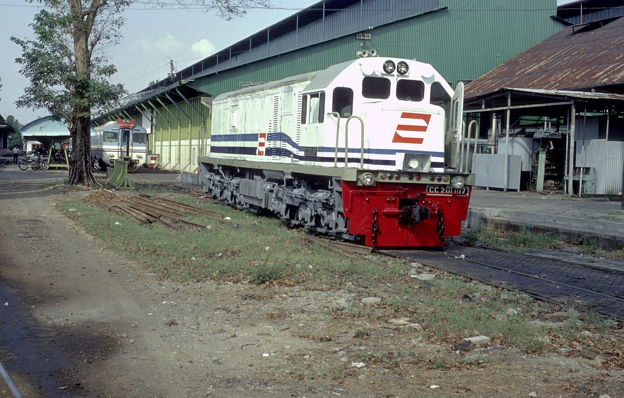 PTKACC201 (201 007 A)